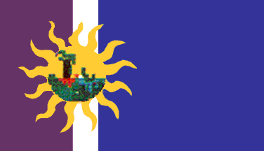 Bandera del municipio la Cañada de Urdaneta, estado Zulia, Venezuela